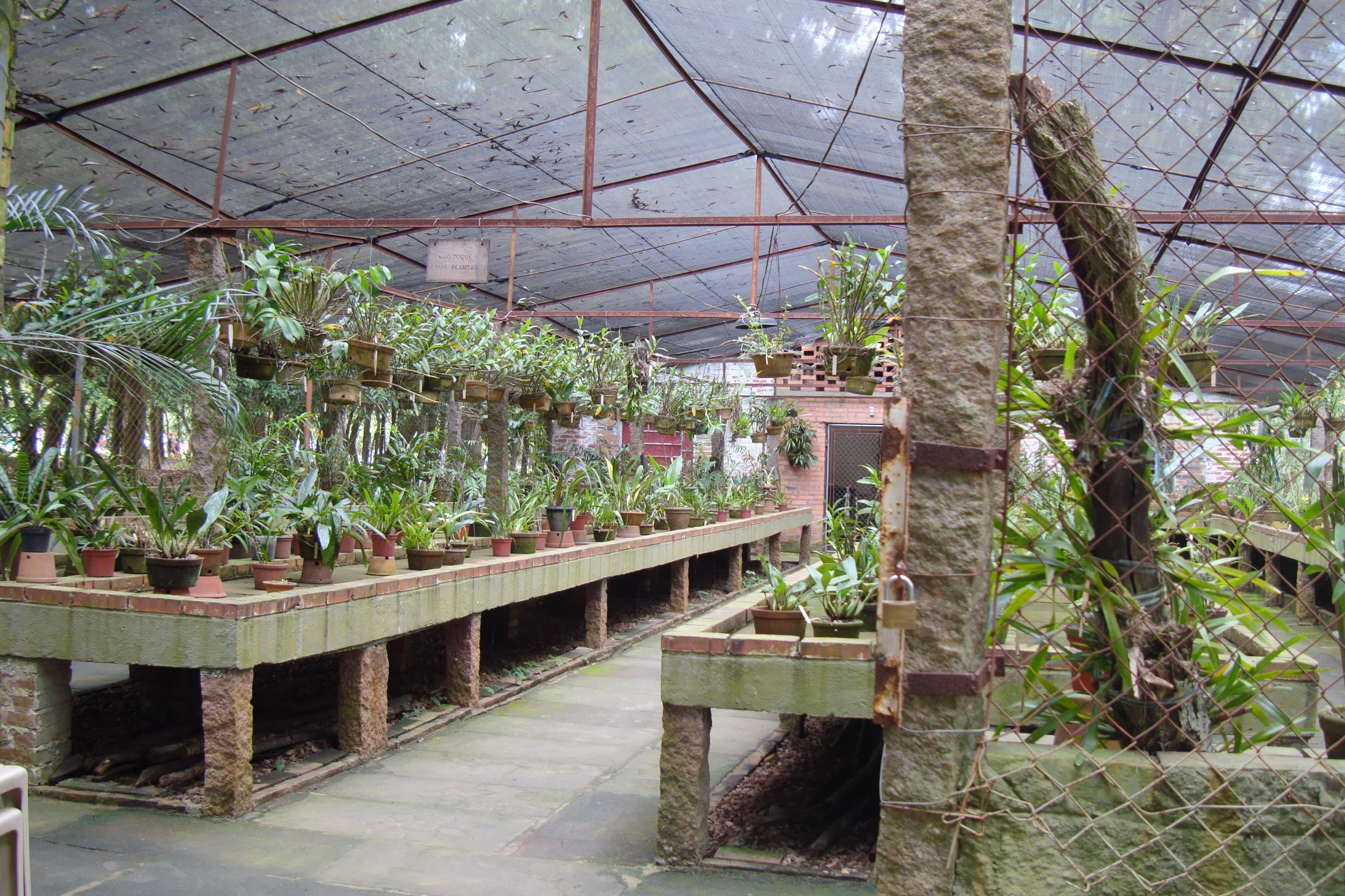 Orquidário Público Municipal de Porto Alegre, no Parque da Redenção